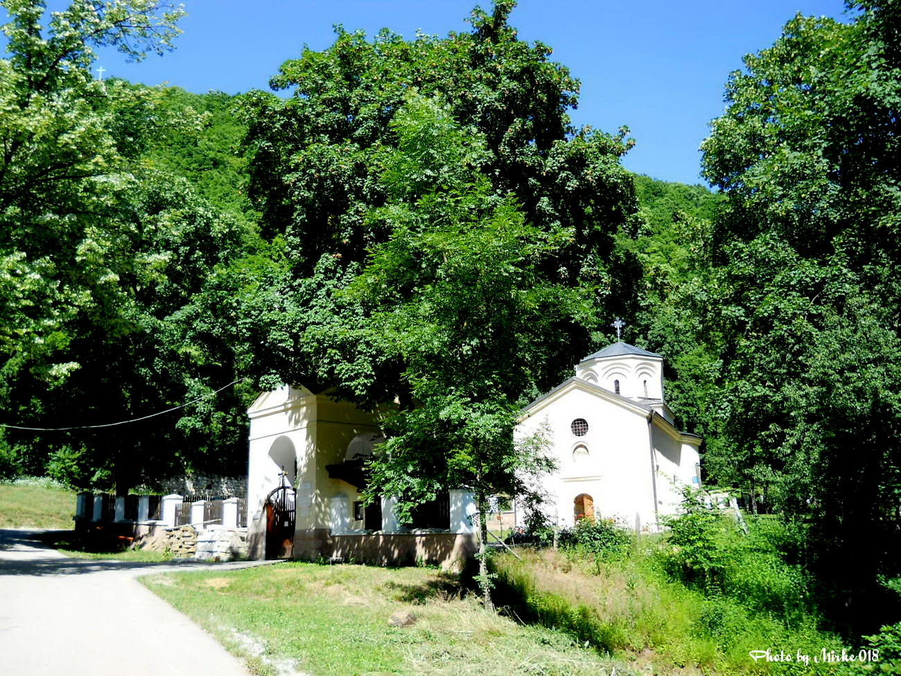 Манастир Светог Архангела Гаврила